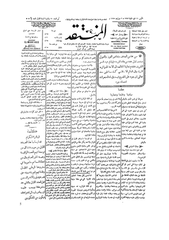 Al Mountaqid n° 1 (2/07/1925)